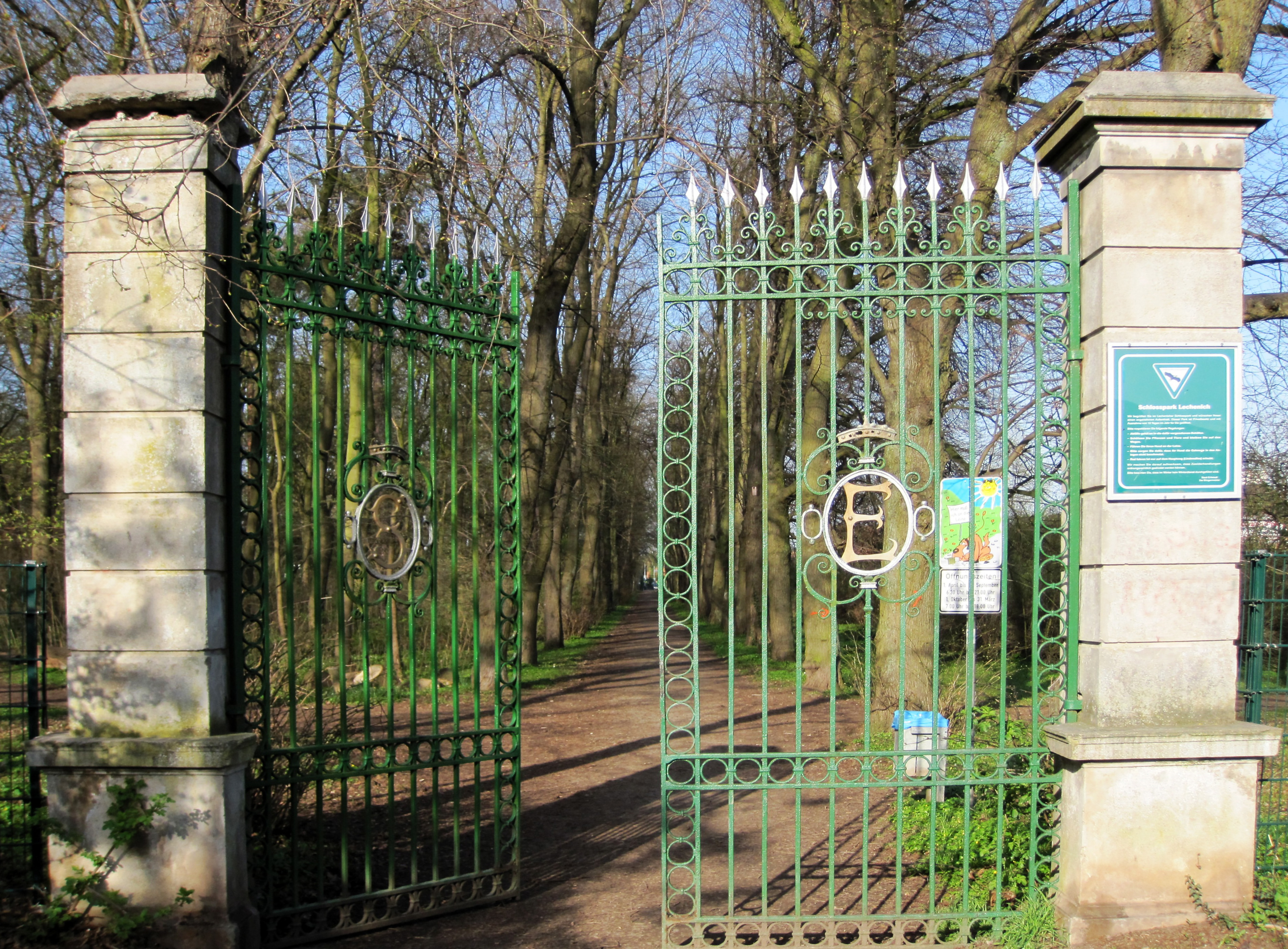 Schlosspark Lechenich,östlicher Eingang über die Lindenallee